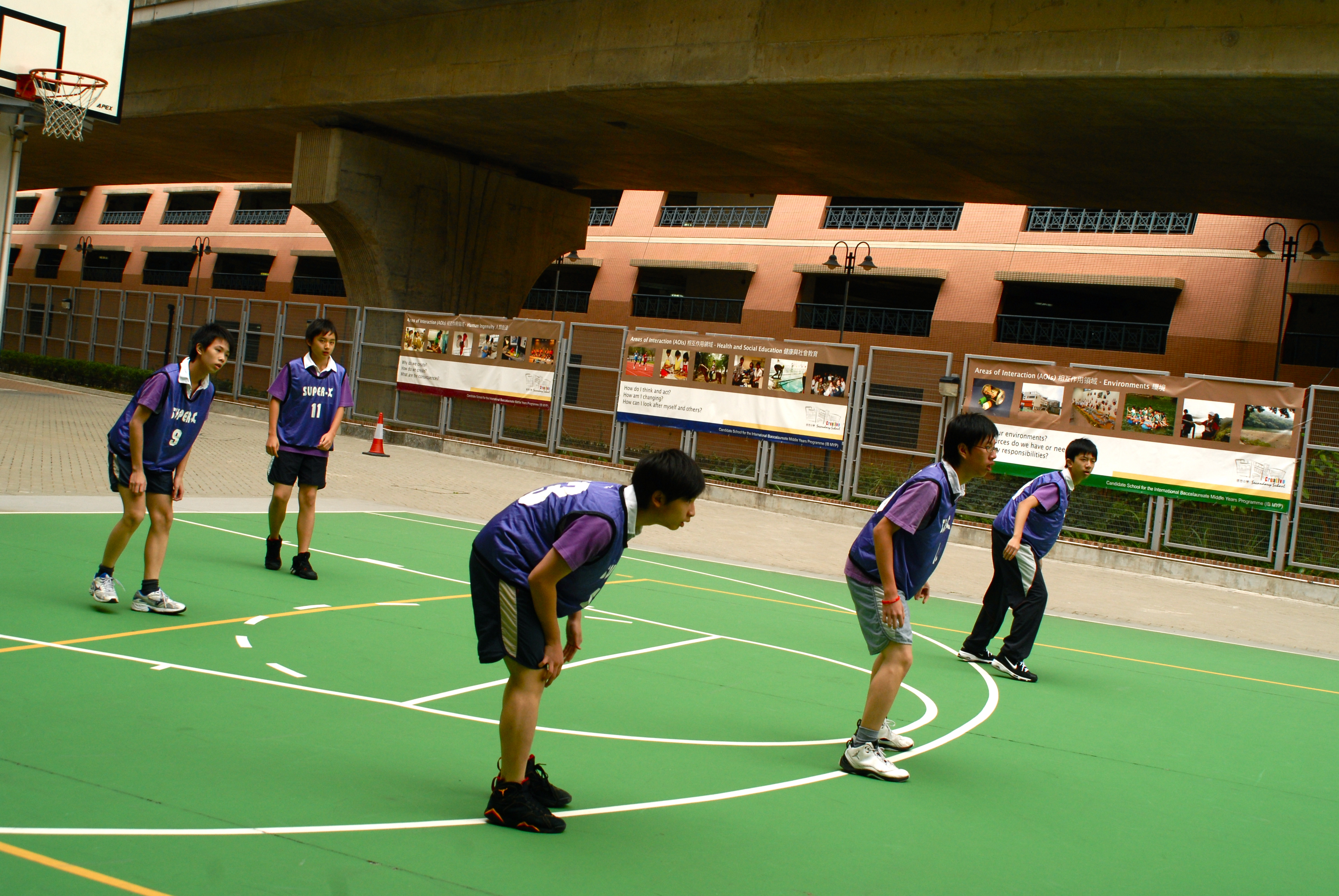 Bauhinia